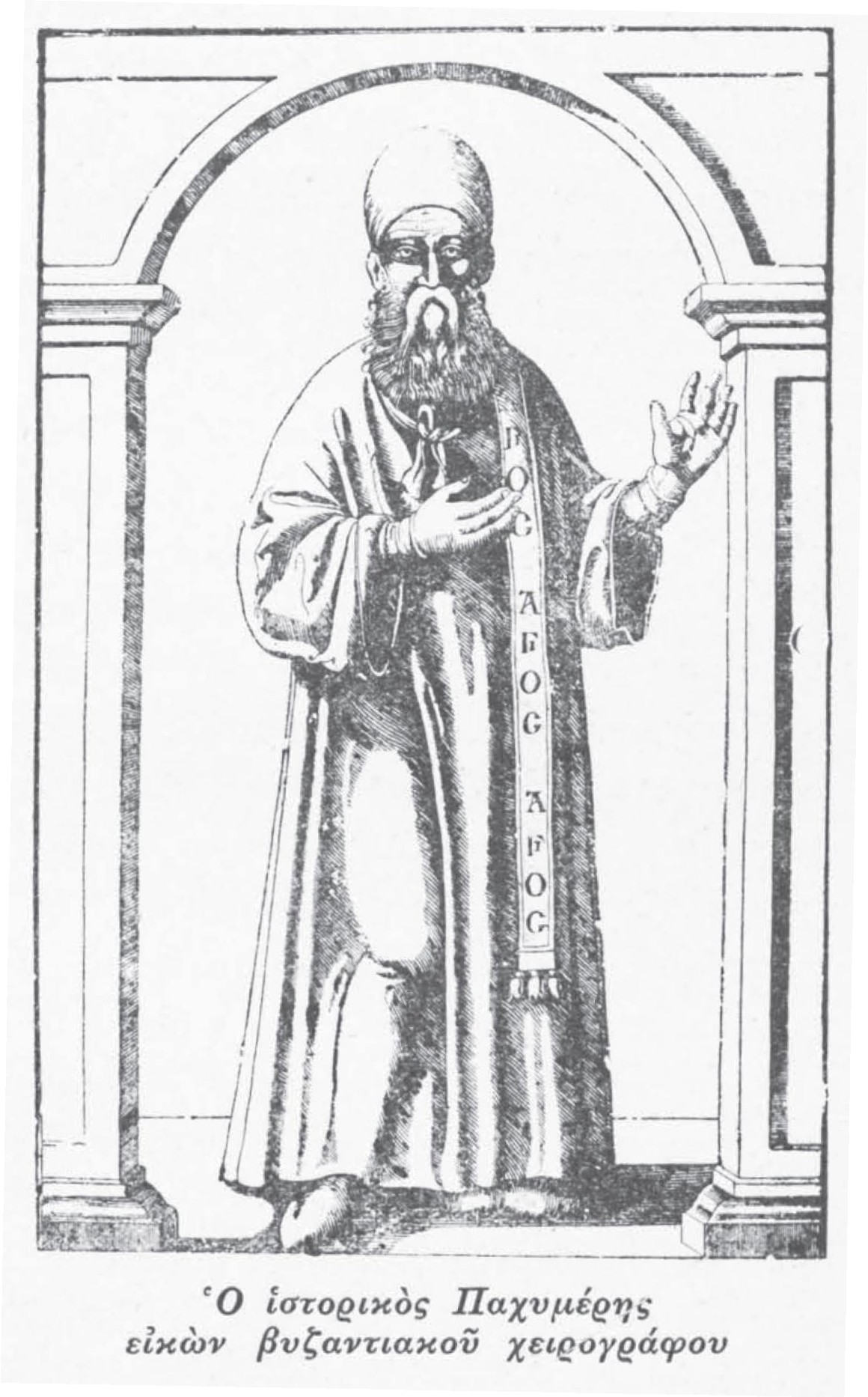 greek scholar